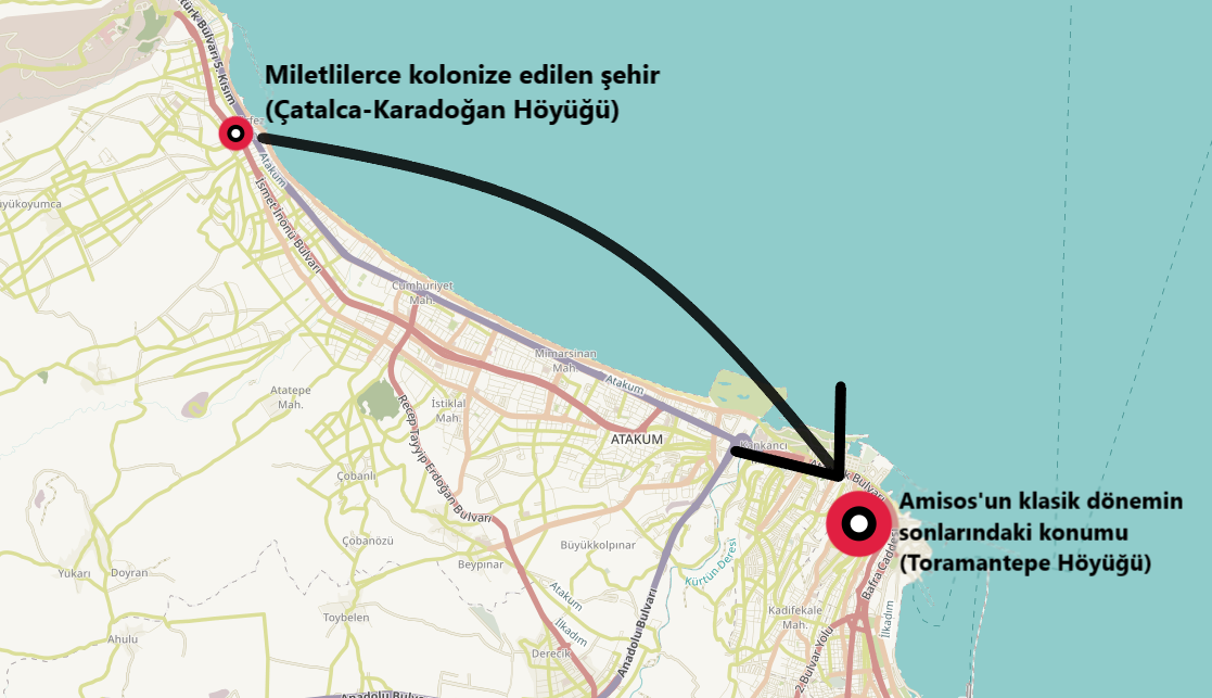 Amisos'un Milet kolonizasyonu dönemindeki ve klasik dönem sonlarındaki yerleşim yeri değişime dair harita. This map may be incomplete, and may contain errors. Don't rely solely on it for navigation.